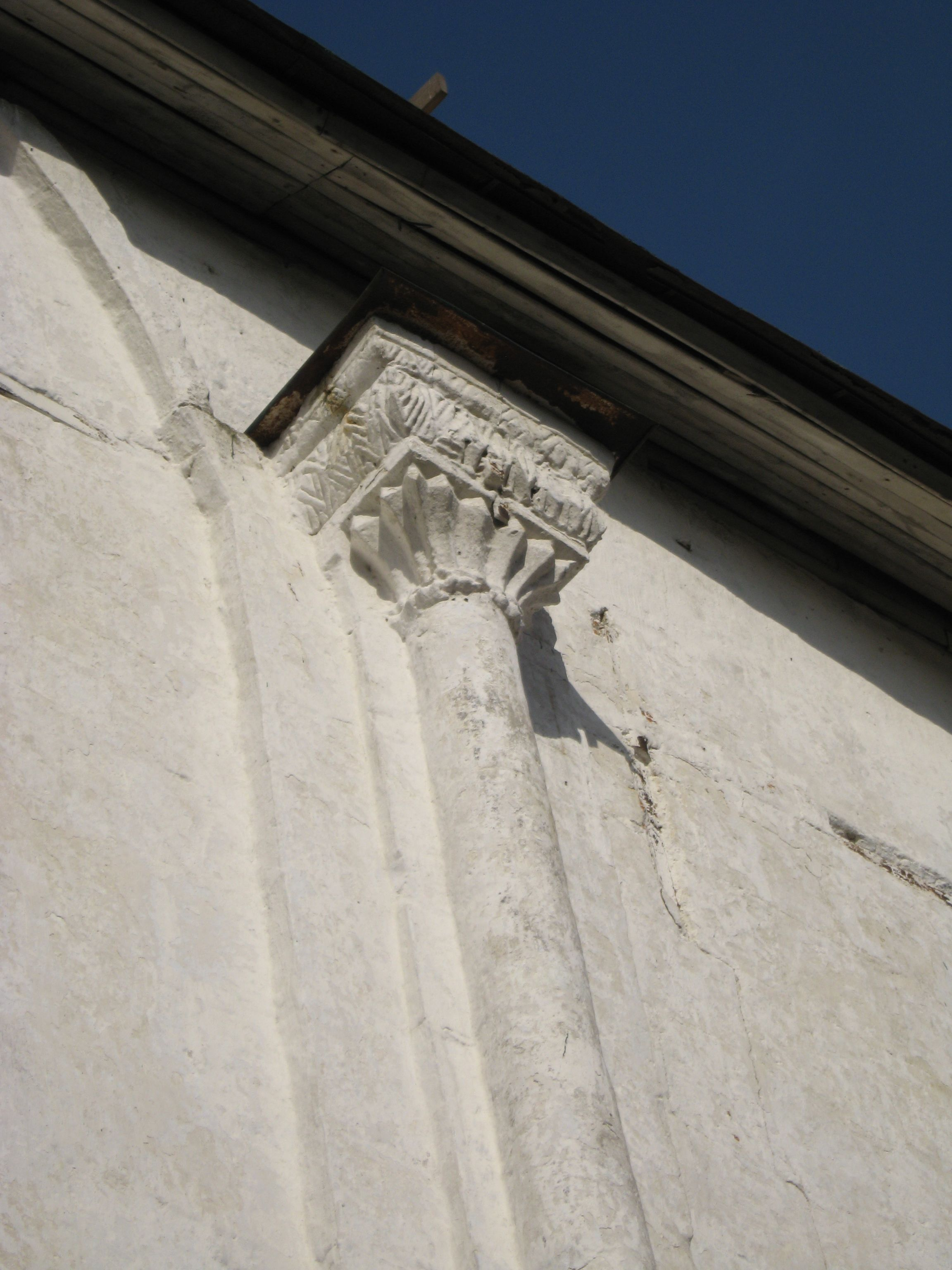 Успенский собор на Городке в Звенигороде. Около 1399 года.